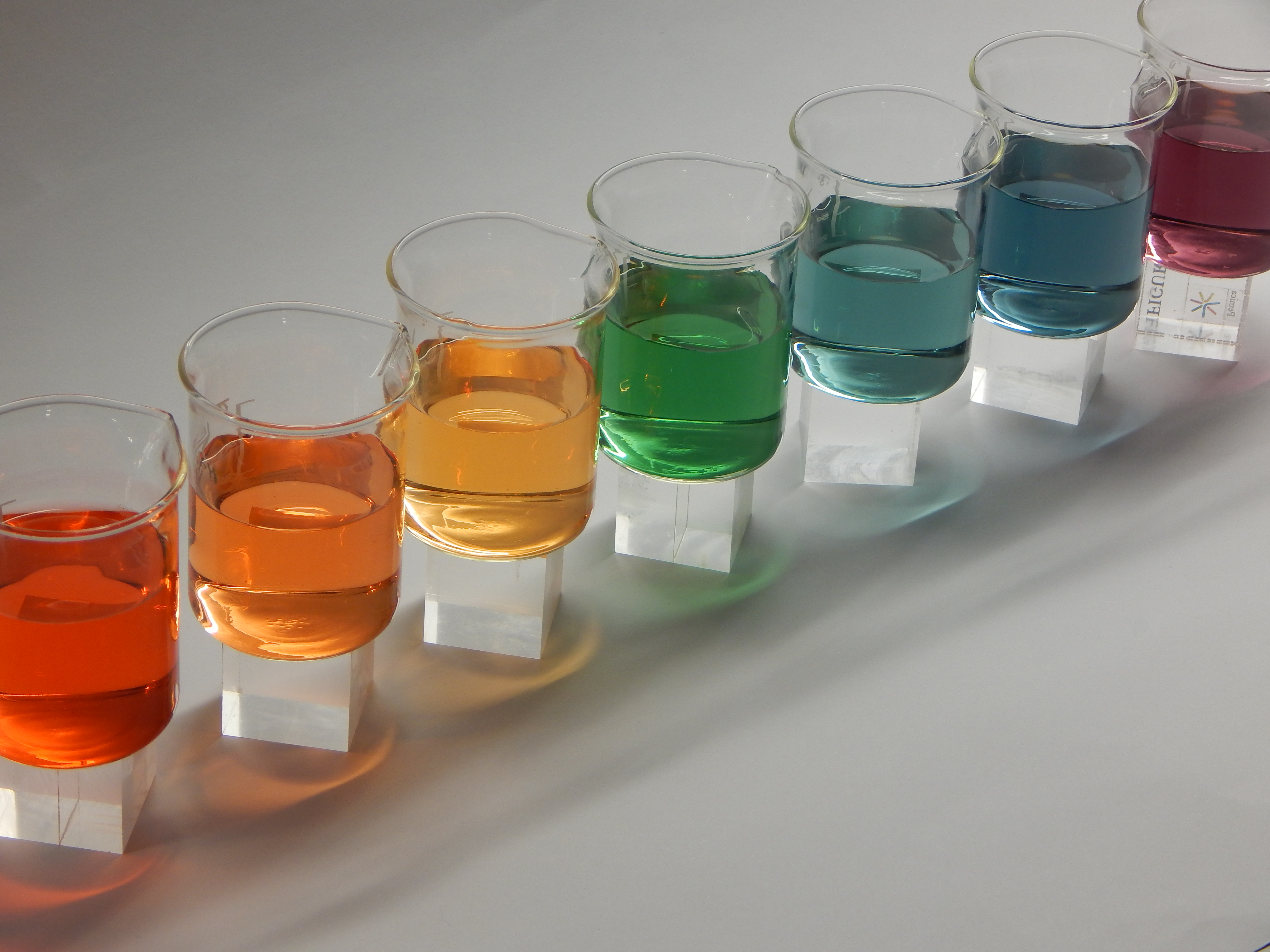 Skala boja u zavisnosti od pH rastvora